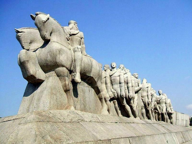 Monumento às Bandeiras, no Parque dos seios de Ibirapuera, em São Paulo, Brasil.